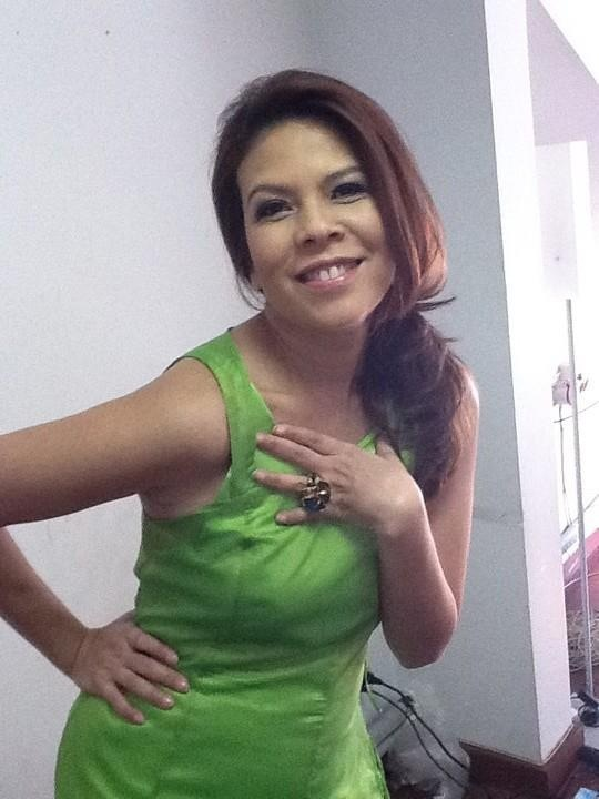 Took viyada